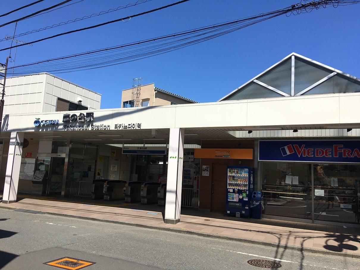 鷹の台駅舎